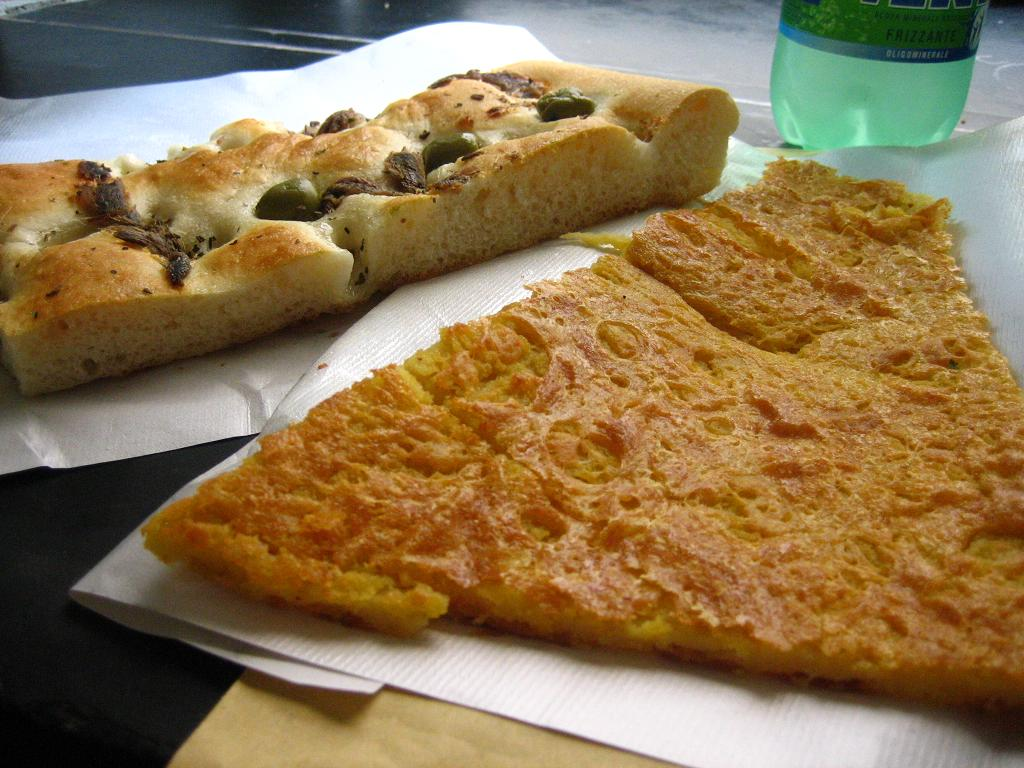 Farinata e Foccacia